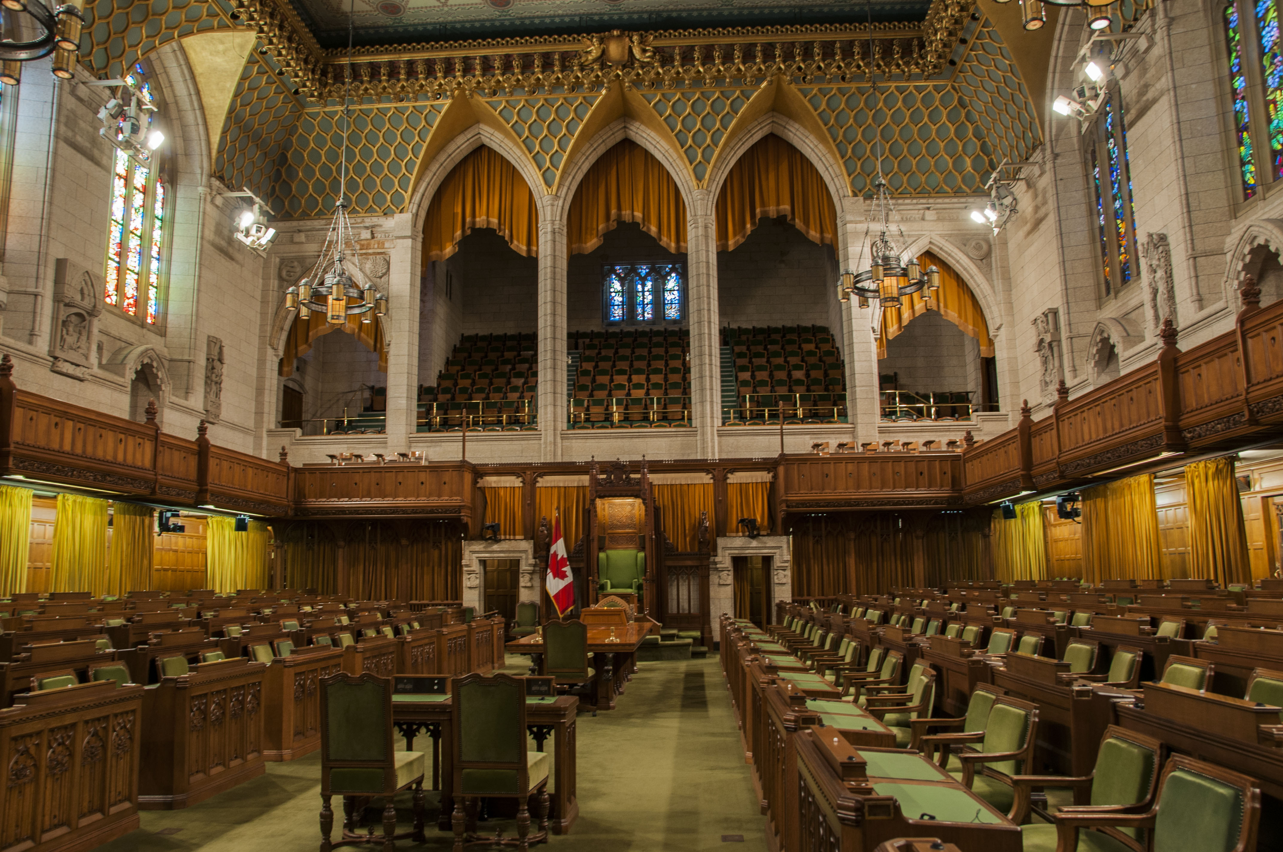 Le bâtiment principal du Parlement du Canada, c'est un bâtiment classé qui contient la Chambre des communes du Canada, le Sénat du Canada et des bureaux de parlementaires